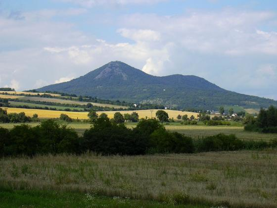 Hora Lovoš, pohled od Čížkovic. Nižší vrchol vpravo je malý Lovoš neboli Kybička.